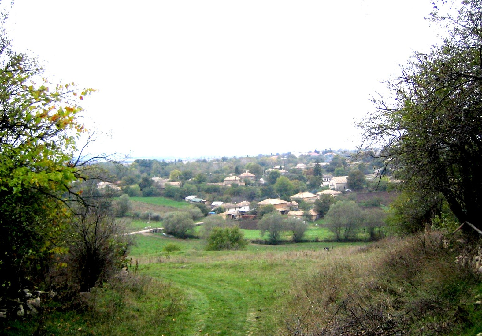 Панорамен поглед към село Ломци, Поповско.